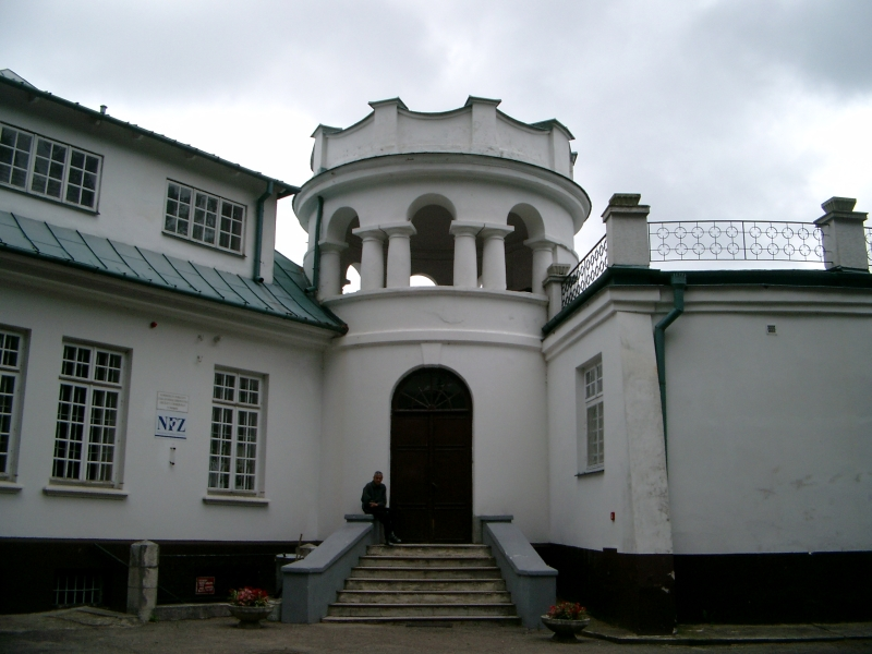 Pałac w Adampolu